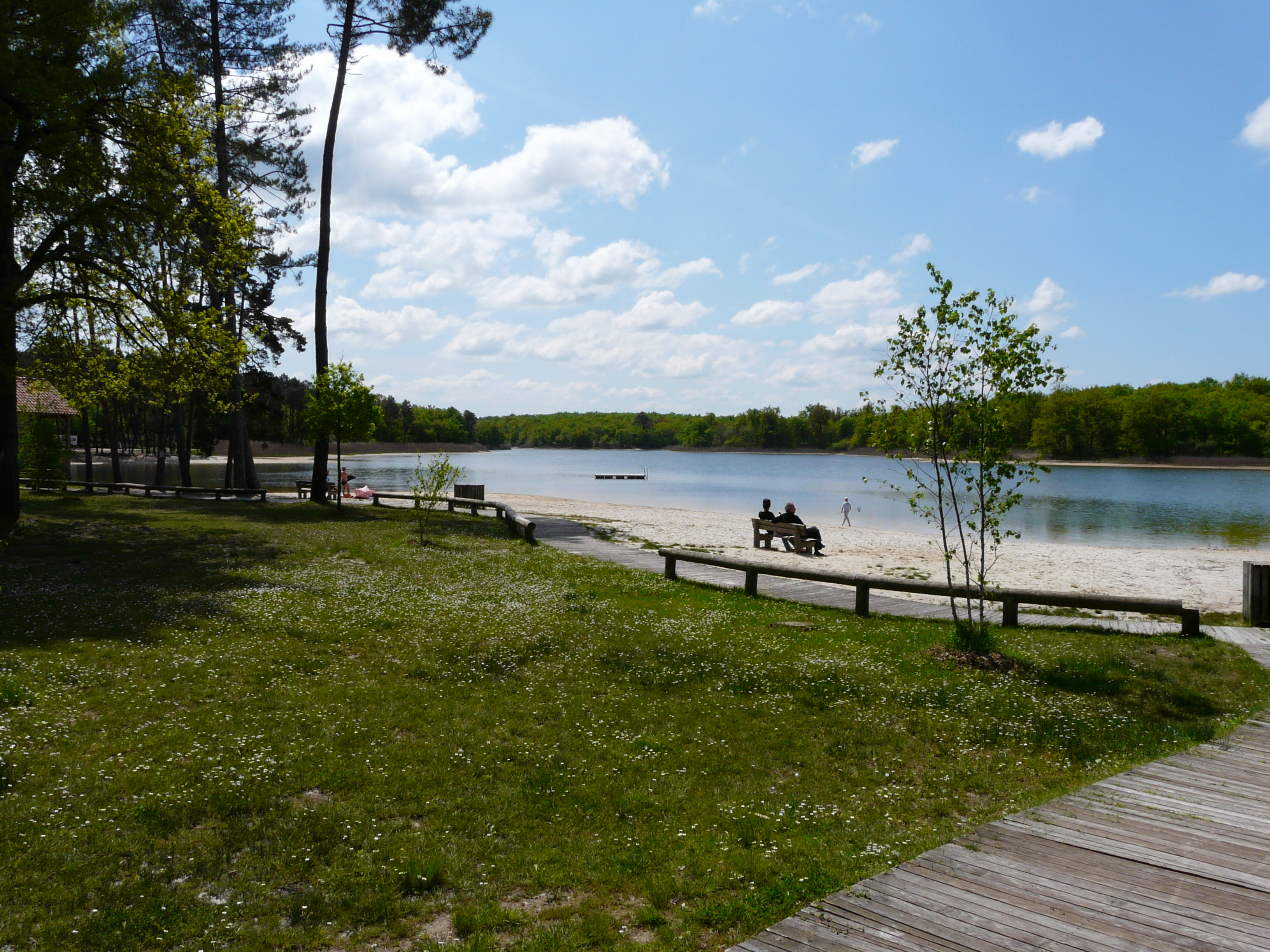 Le grand étang de La Jemaye, Dordogne, France